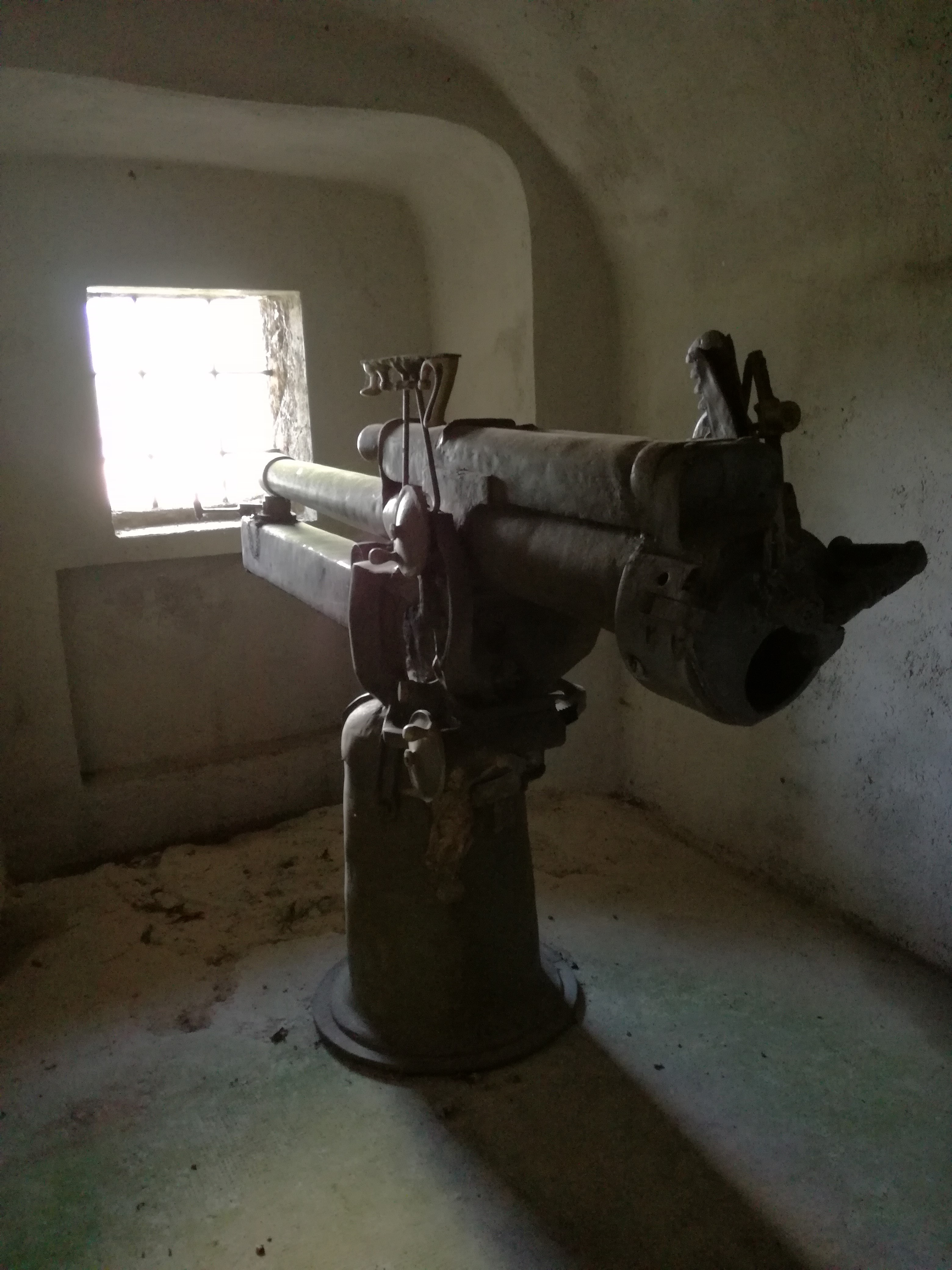 Forte Coldarco - Kanone 75A auf Schwenklafette